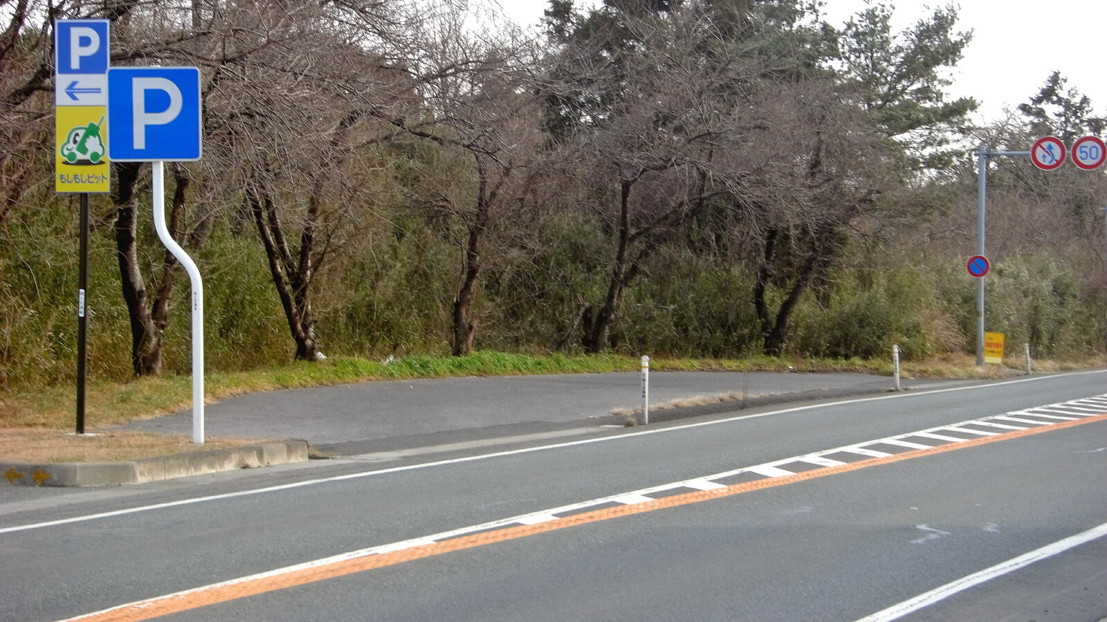 国道6号線のもしもしピット